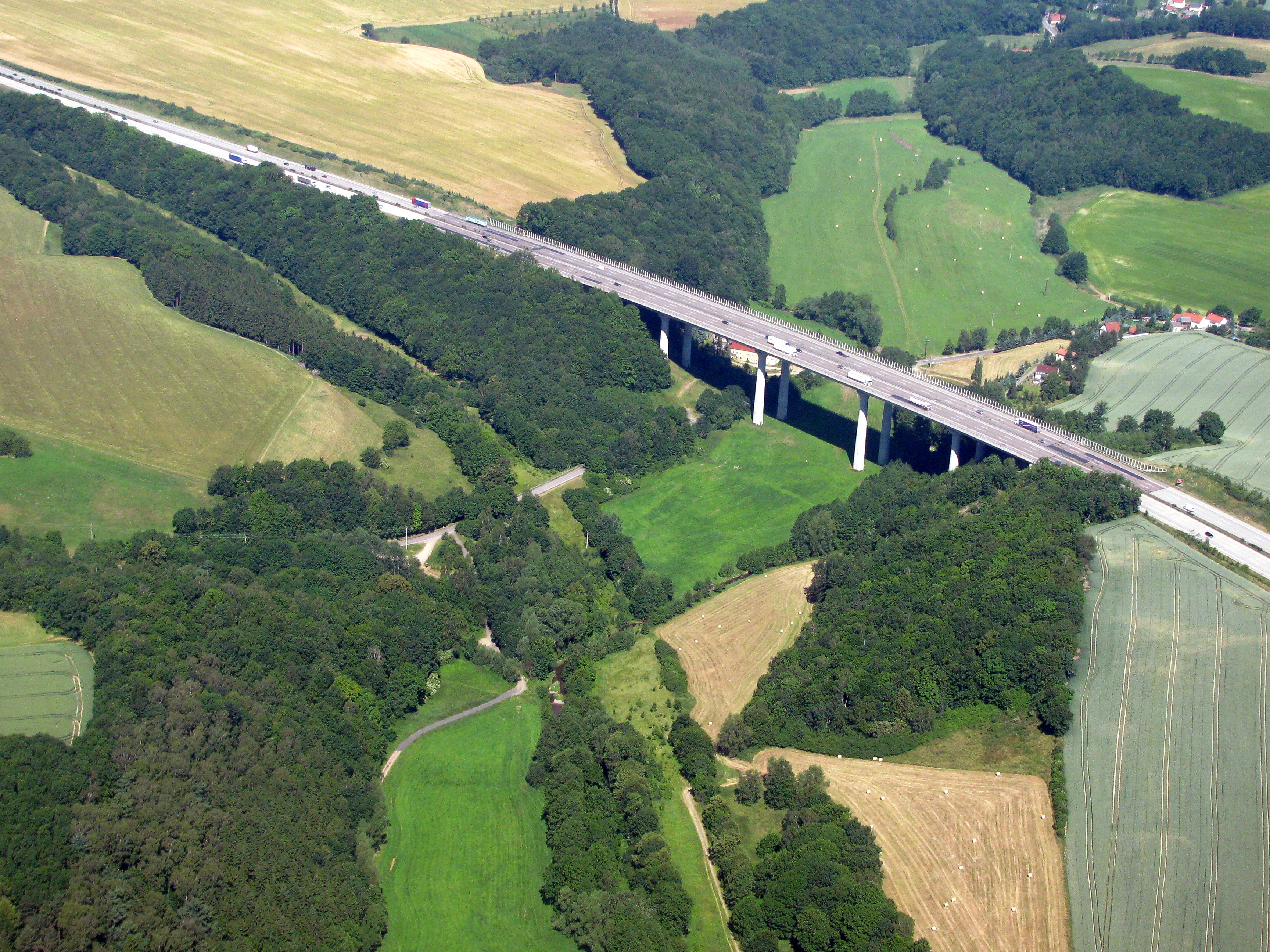 Tanneberger Loch, Luftbild Triebischtalbrücke